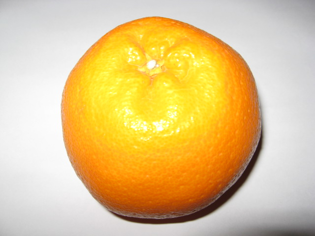 A variety of Japanese made orange.